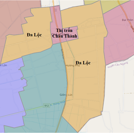 xã Đa Lộc, Châu Thành, Trà Vinh